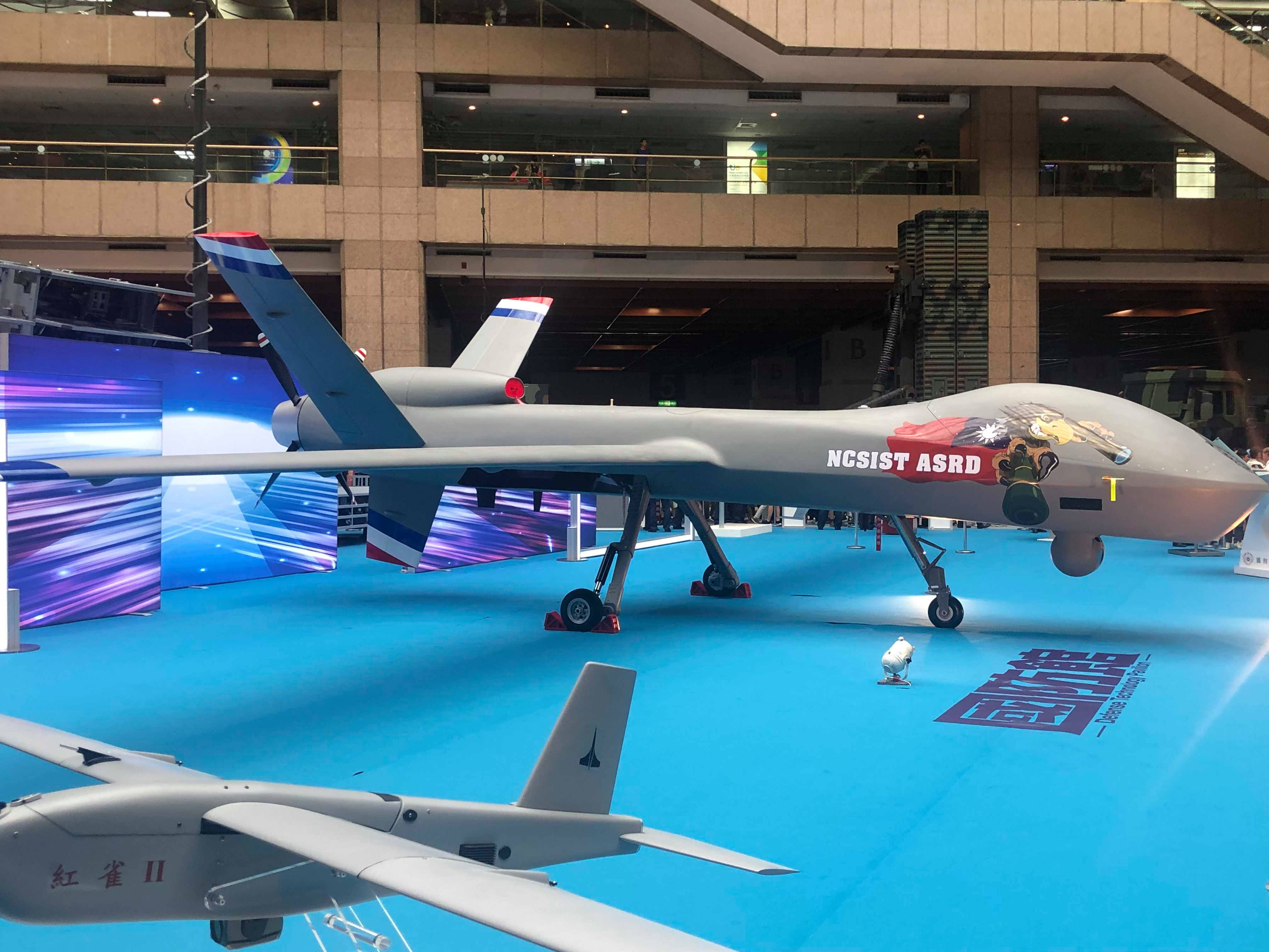 Medium-altitude long-endurance unmanned aerial vehicle designed by NCSIST,Republic of China (Taiwan)